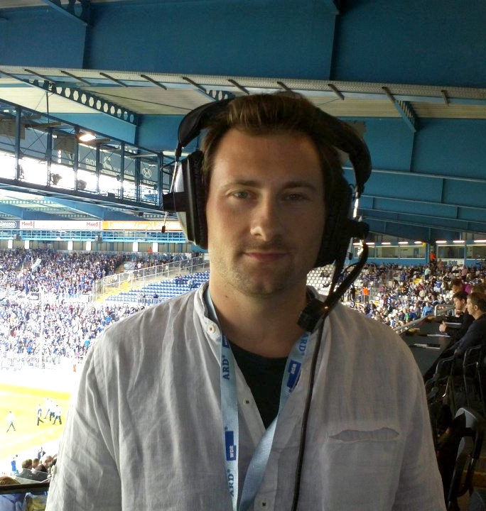 Robert Hunke bei der Arbeit als Fußballkommentator für den Westdeutschen Rundfunk